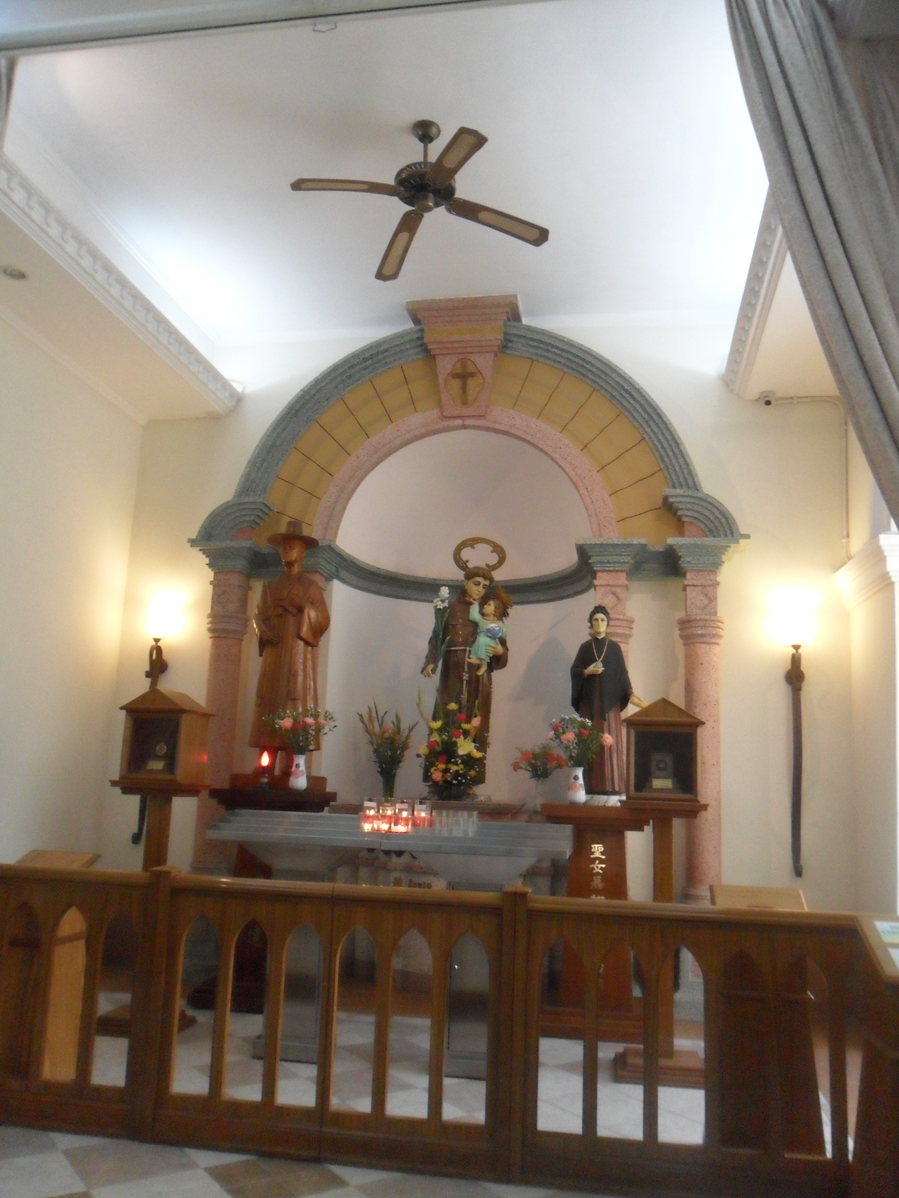 中文(香港): 聖安多尼堂, 澳門, 中國